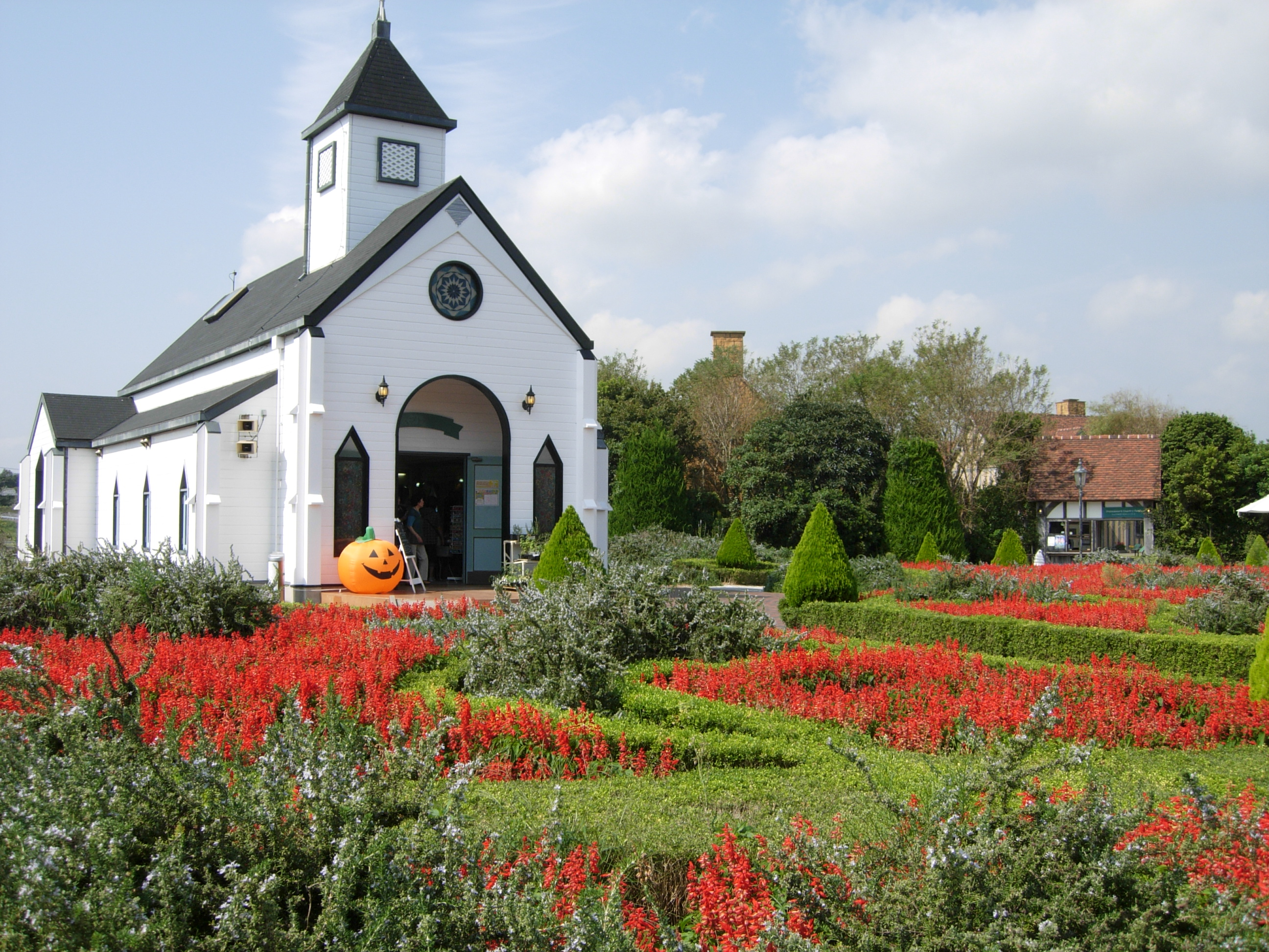 千葉県南房総市の道の駅ローズマリー公園。